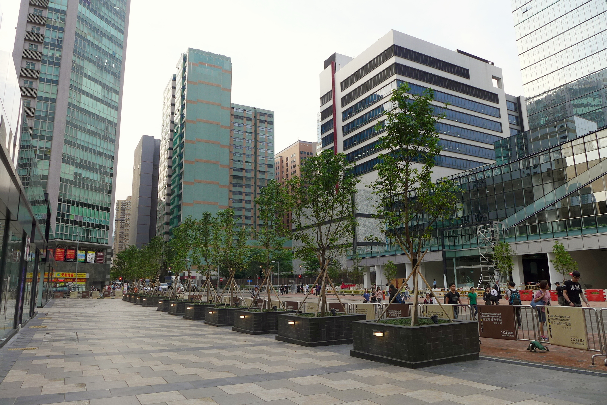 Shek Mun